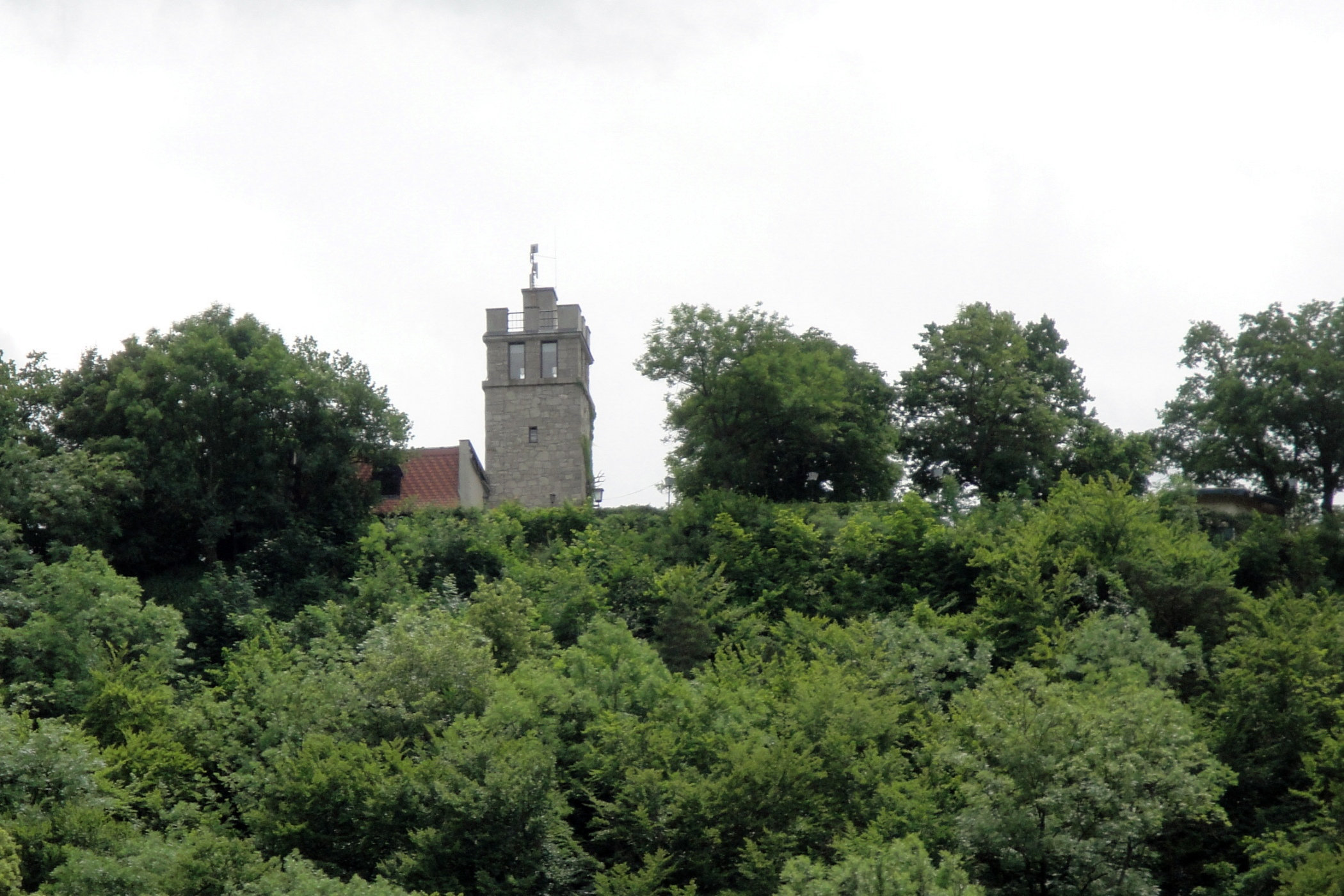 Bismarckturm (Burgscheidelturm), Naumburg (Saale)